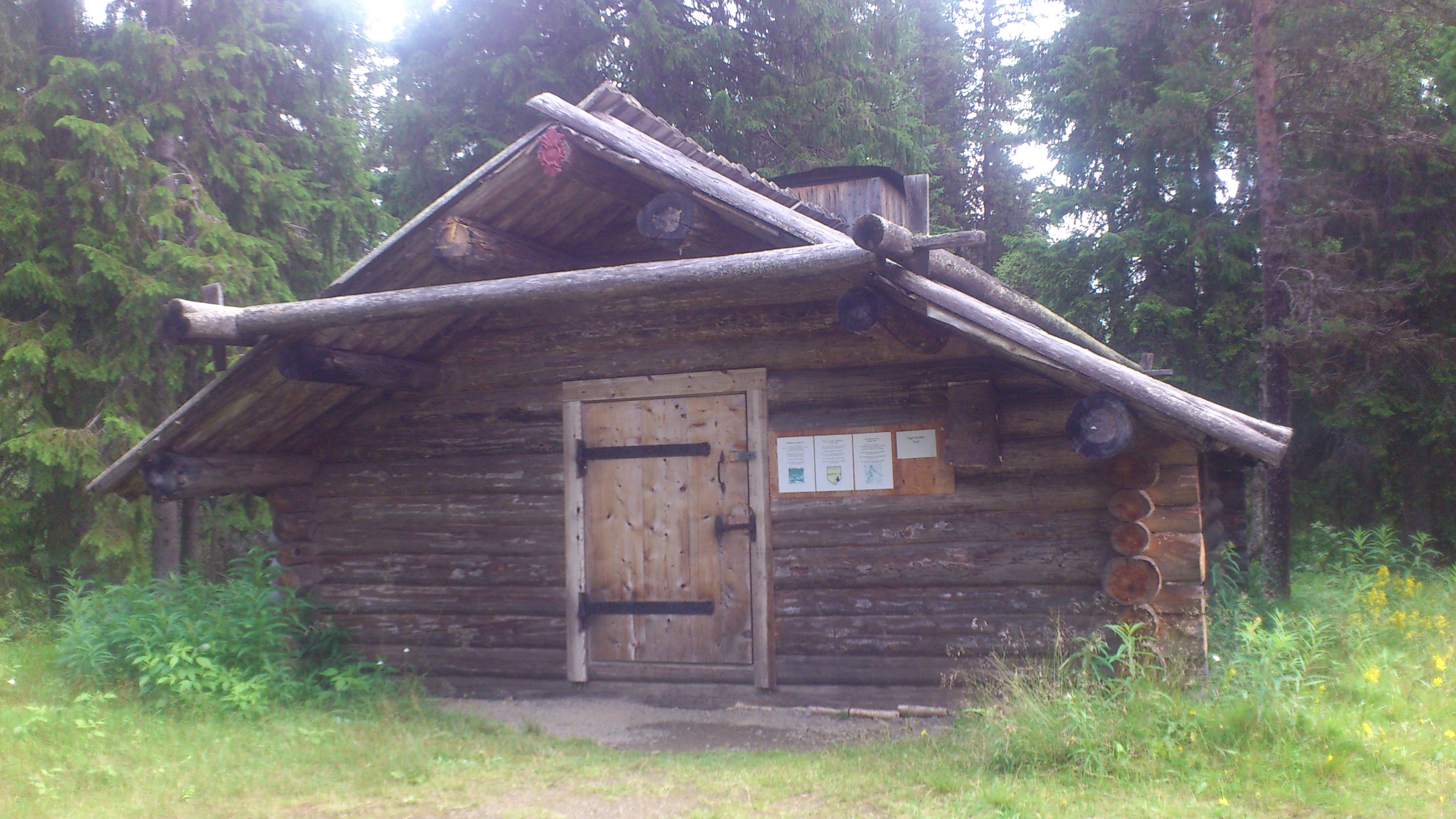 Själastugan på Rombovallen